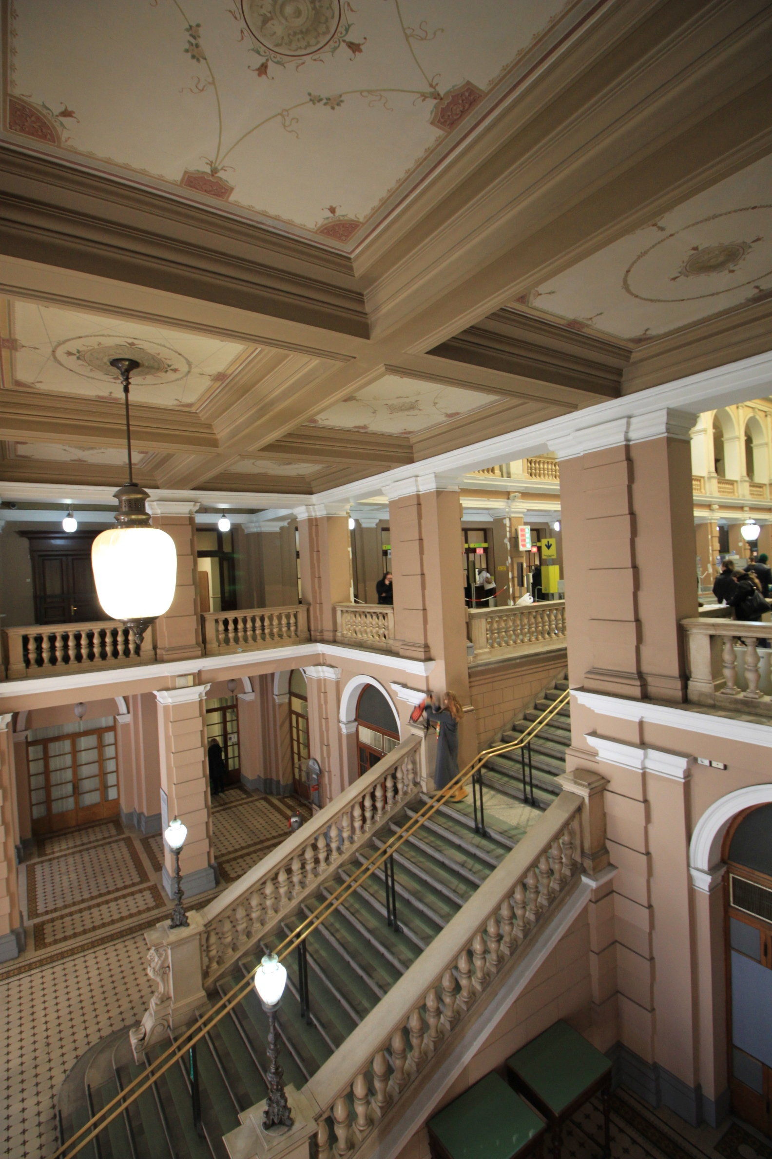 Palazzo delle Poste, Piazza Vittorio Veneto, Trieste; Interiore